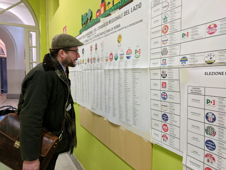 Berengar Elsner Von Gronow observing in Rome, 4 March 2018